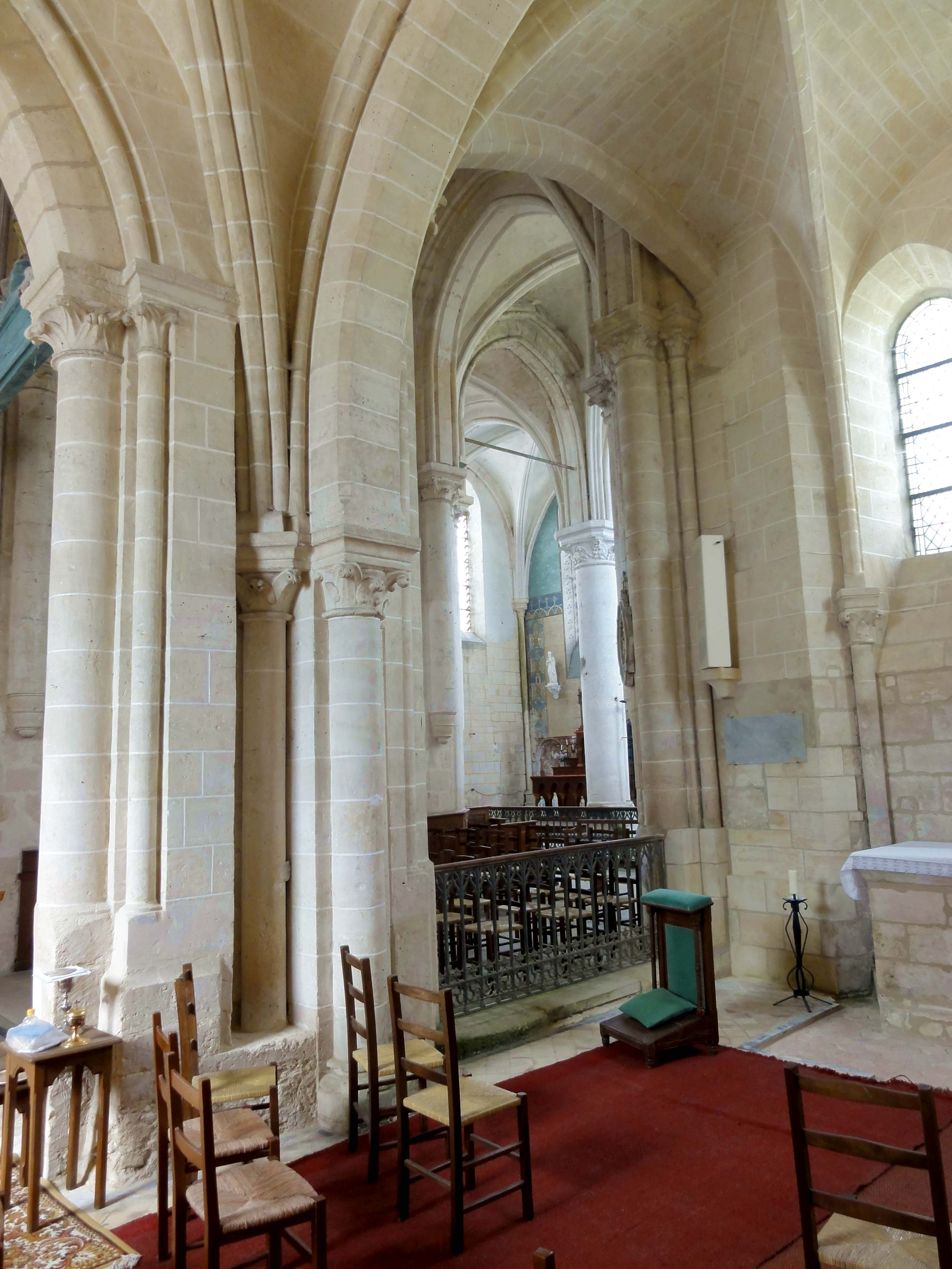 Intérieur de l'église - voir titre.